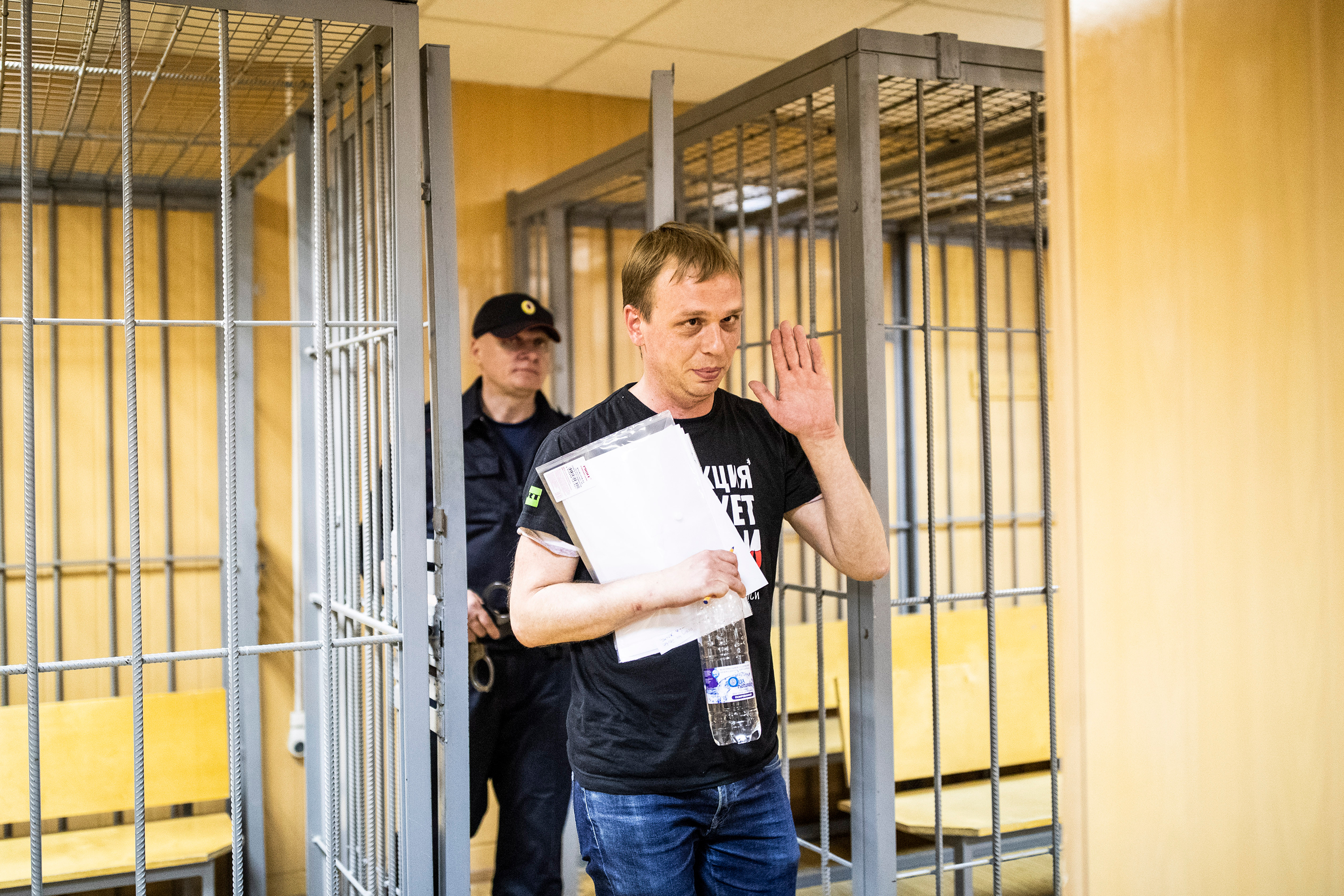 Иван Голунов в зале Никитинского суда. Фото: Евгений Фельдман.